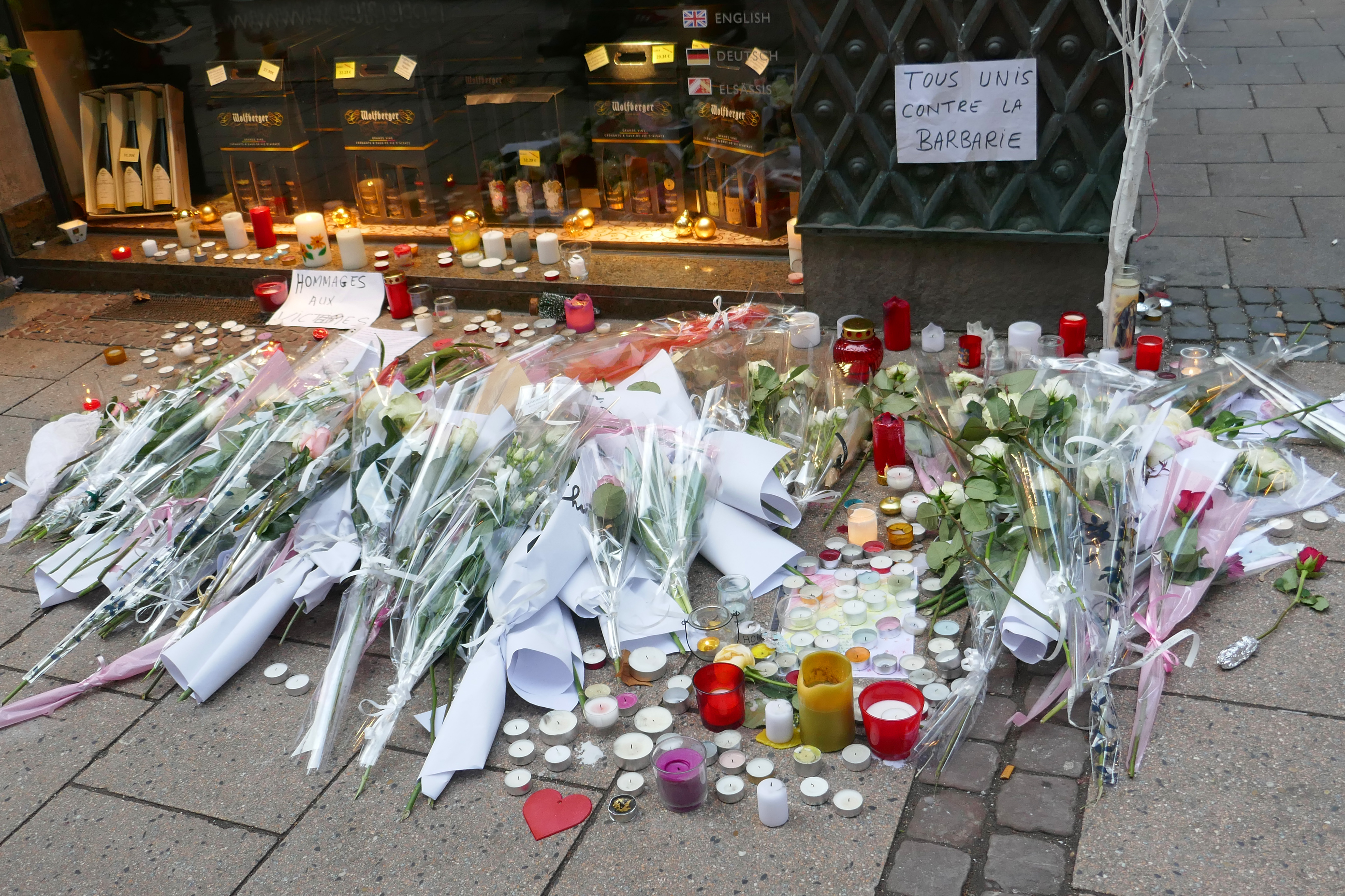 Fusillade de Strasbourg 2018 : hommages dans la rue des Orfèvres,le surlendemain.